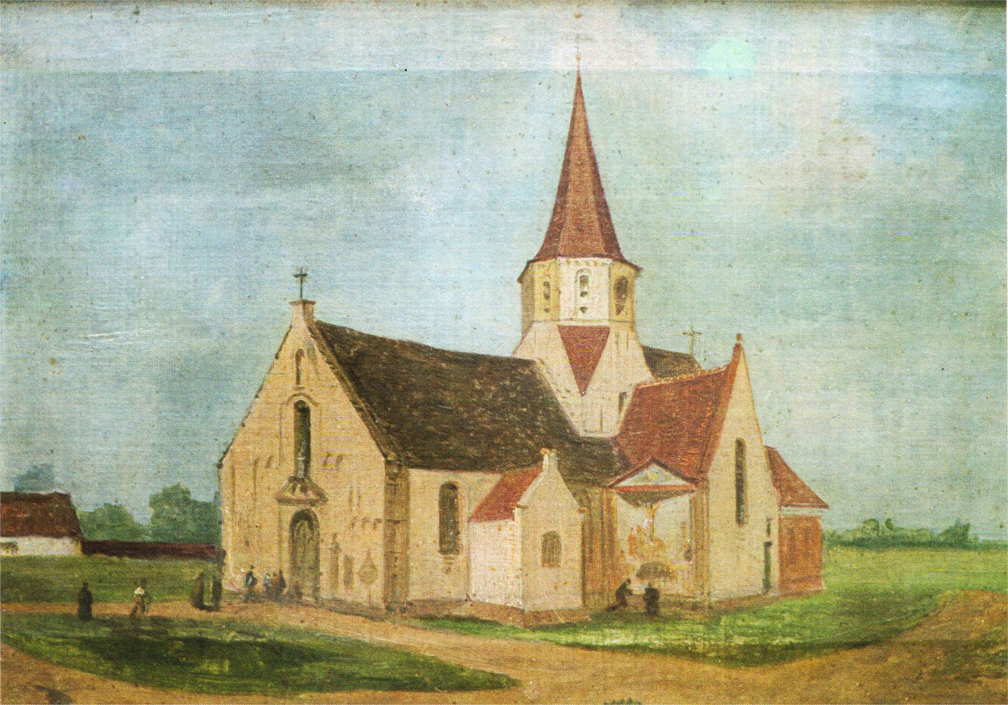 Schilderij gemaakt in opdracht van koster Bracke in 1865. Onderwerp : "Oude Sint-Gertrudiskerk Wichelen gelegen op het Dorp"